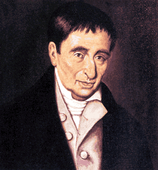 La imagen de Manuel de Salas, pertenece al proyecto El Diputado Bernardo Ohiggins en el Congreso de 1811